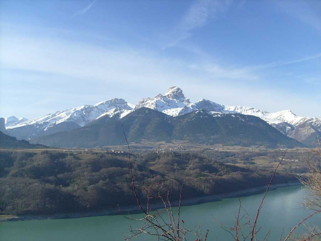 L'Obiou (2 789 m) et au premier plan le lac du Sautet près de Corps( Isère, vallée du Drac)